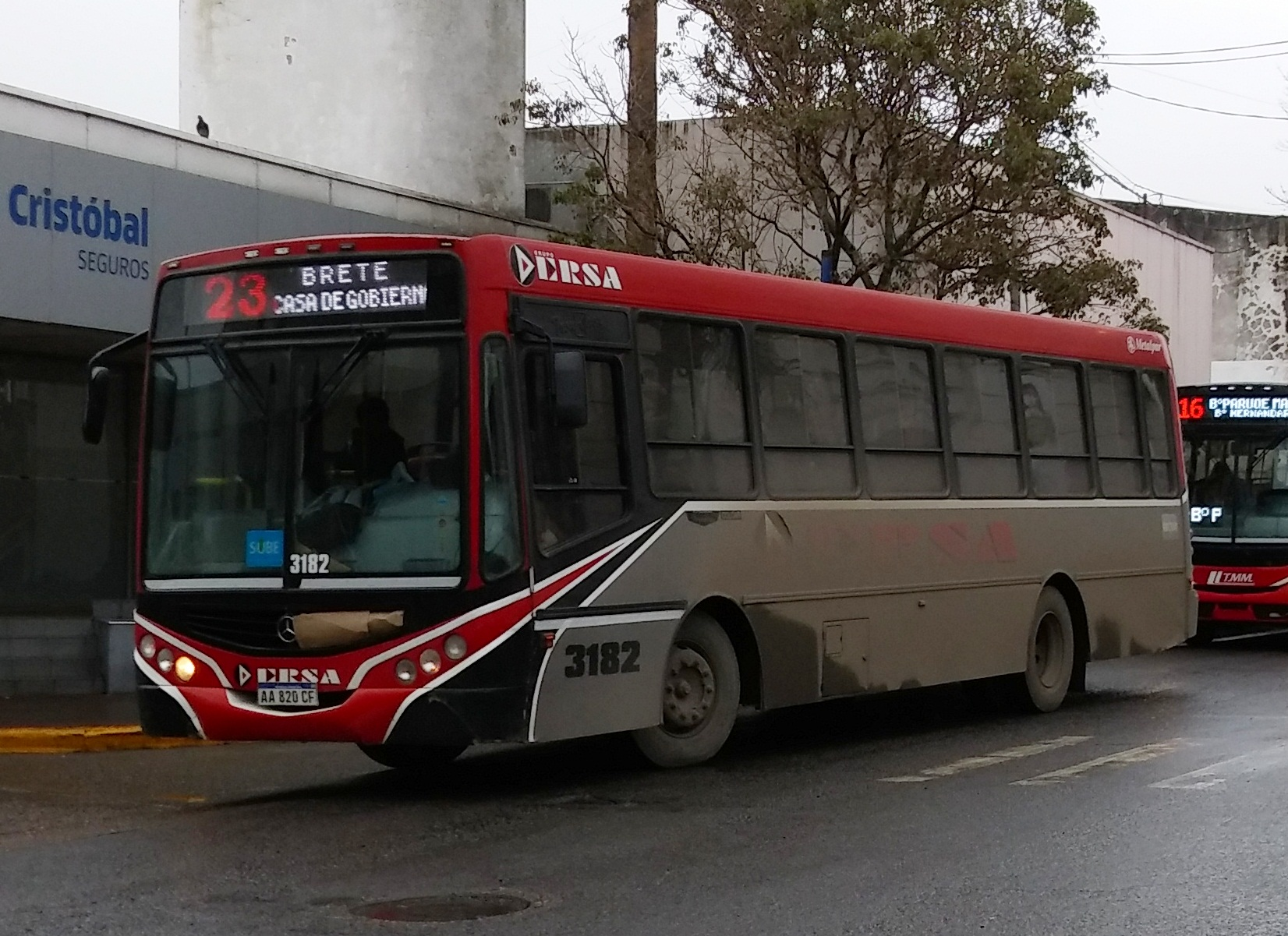 Interno 3182 de la línea 23 de la empresa ERSA Urbano Paranpa Carrocería Metalpar sobre chasis Mercedes-Benz OF1418